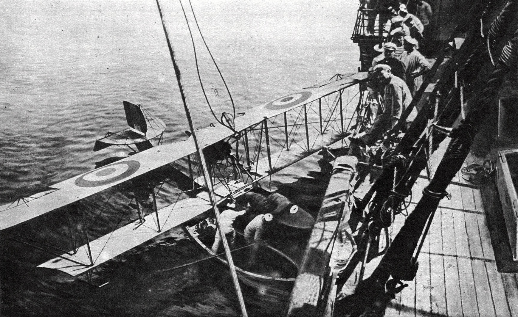 Hydravion de lutte contre les sous-marins en 1918 après amerrissage. Marine française ? Sans précision sur le lieu exact en mer. Photographie publiée par l'hebdomadaire Le Miroir le 7 juillet 1918.